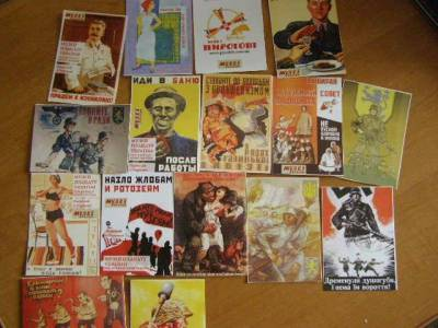 Календарики музею у стилі плакатів